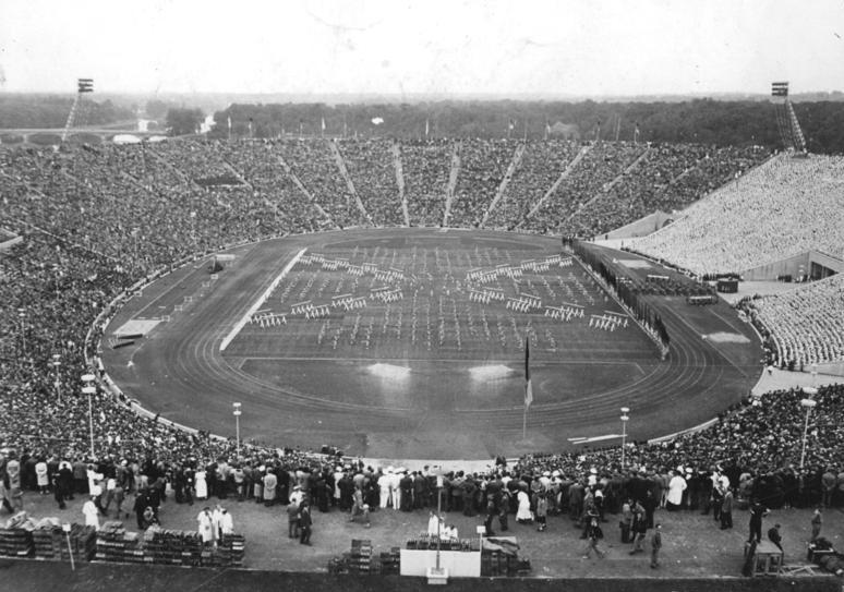 Zentralbild-Telefoto Bey-Krz. II. Deutsches Turn- und Sportfest in Leipzig Festlicher Aufmarsch und Sportschau der demokratischen Sportbewegung Im erstmals vollbesetzten, neuerbauten Zentralstadion in Leipzig fand am Sonnabend, dem 4.8.1956, vor 100 000 Zuschauern der festliche Aufmarsch und die Sportschau der demokratischen Sportbewegung statt. UBz: Blick vom Glockenturm während der Sportschau.